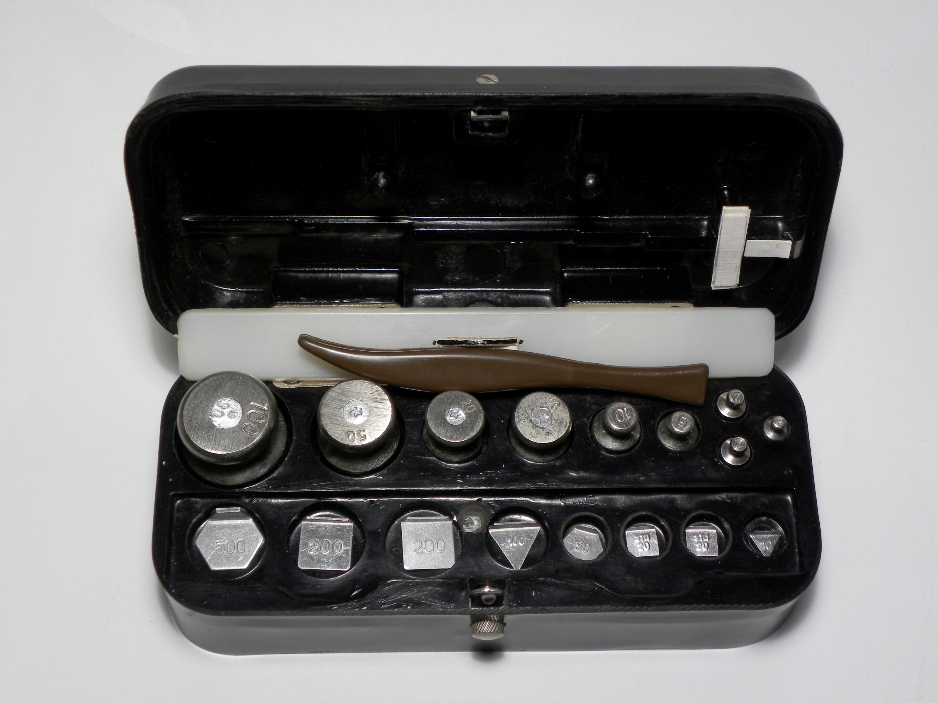 Odważniki wagi laboratoryjnej